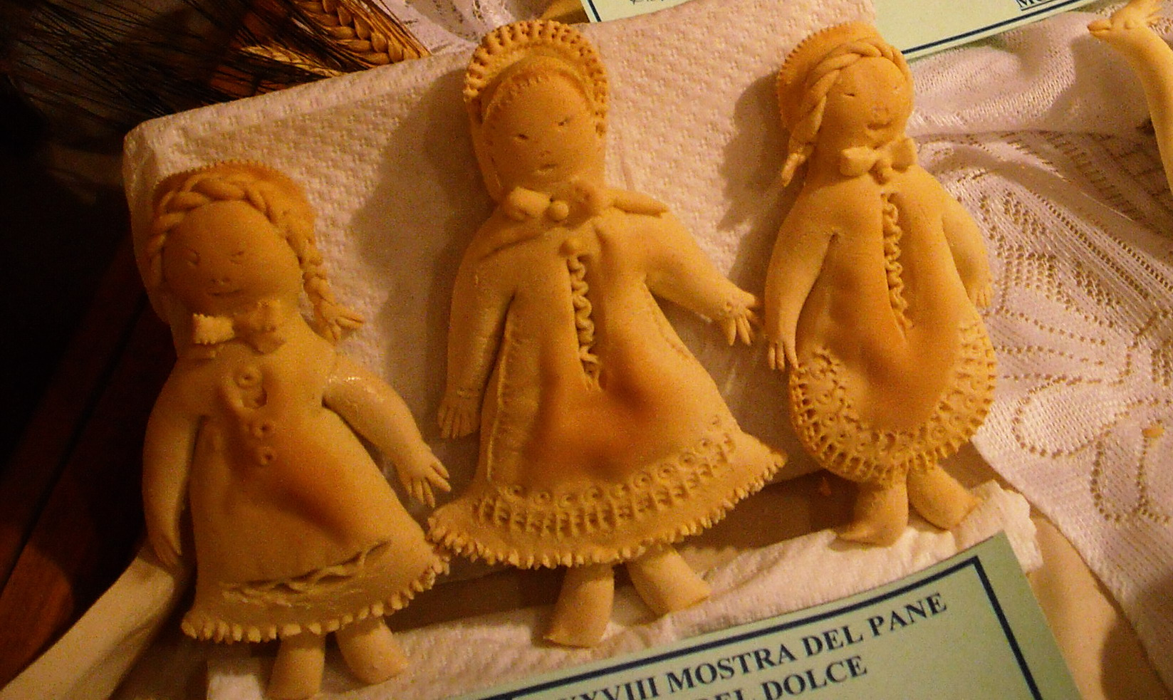 Mostra di pani e dolci tradizionali della Sardegna - Casa Angioni, Quartucciu (Cagliari).